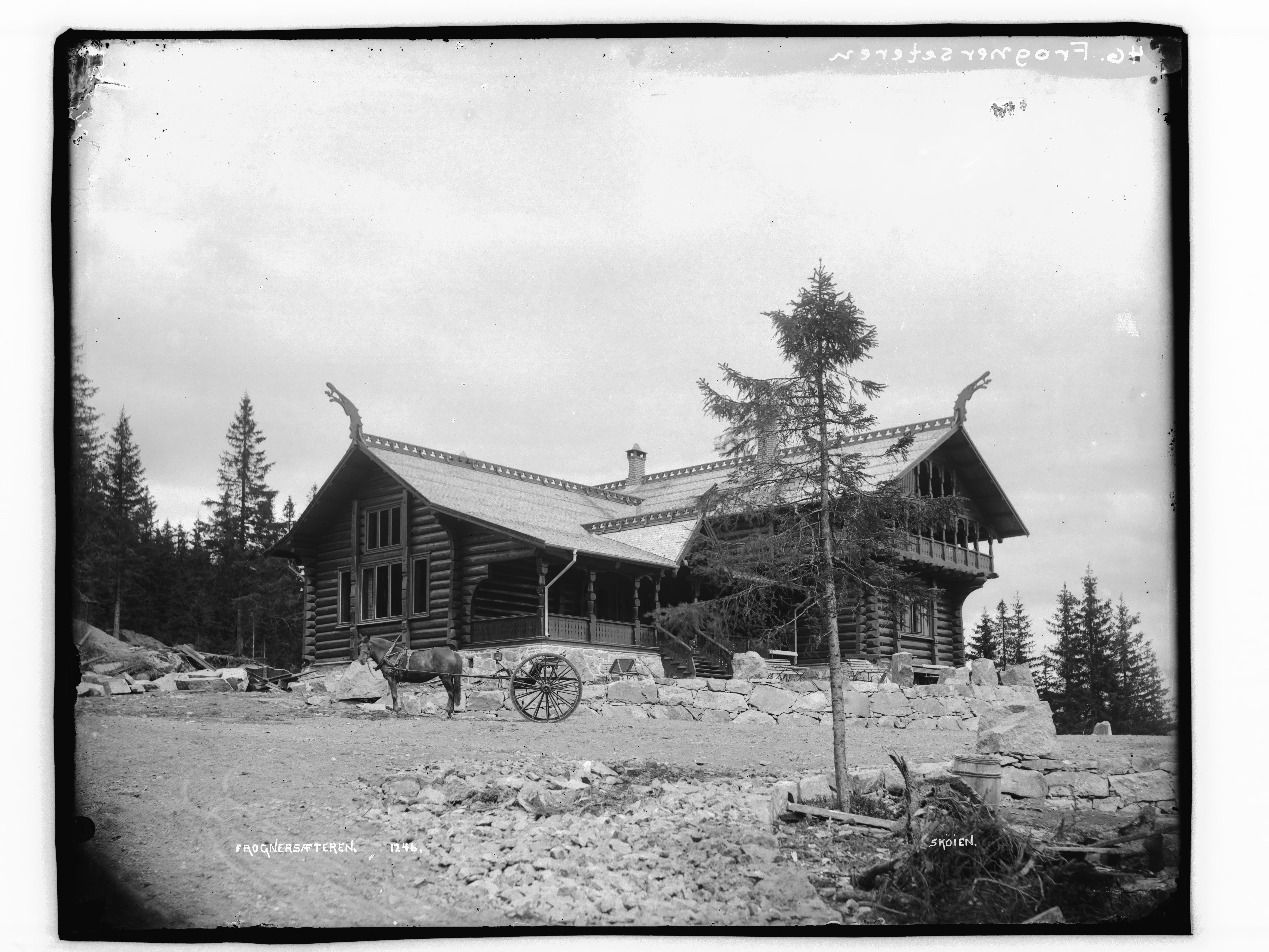 Påskrift negativ: Frognersæteren. 1246. Skøien Påskrift negativ: 46. Frognerseteren [Riksantikvaren] Påskrift konvolutt: B-46 V.Aker. Frognerseteren. Hovedrestauranten. [Riksantikvaren] Sted: Frognerseteren,Vestre Aker Kommune: Oslo Fylke: Oslo Tagger: Frognerseteren restaurant fasade hest karjol